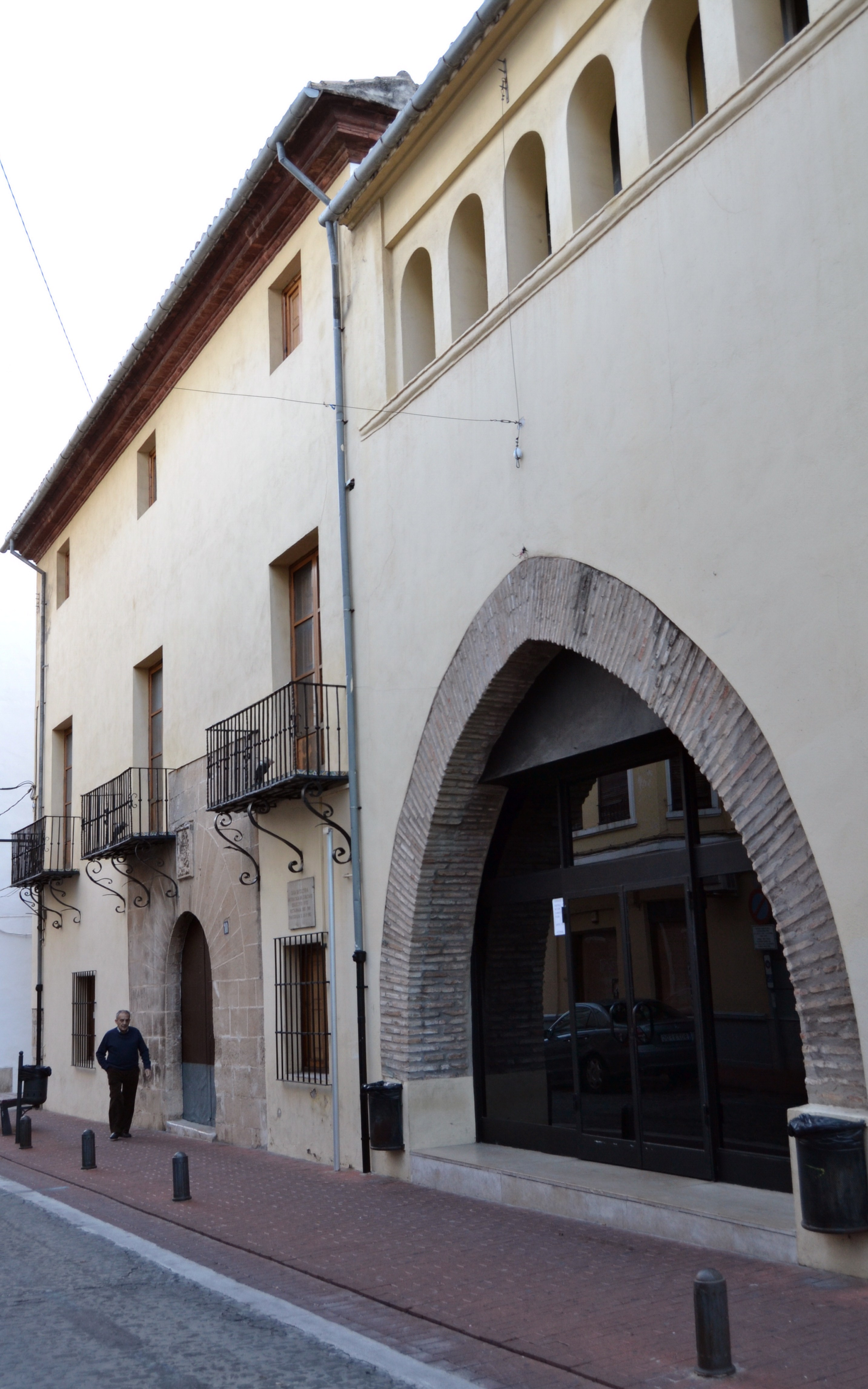 Casa Maians d'Oliva.